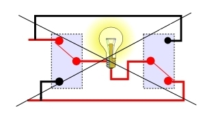 C-korrespondance (el)